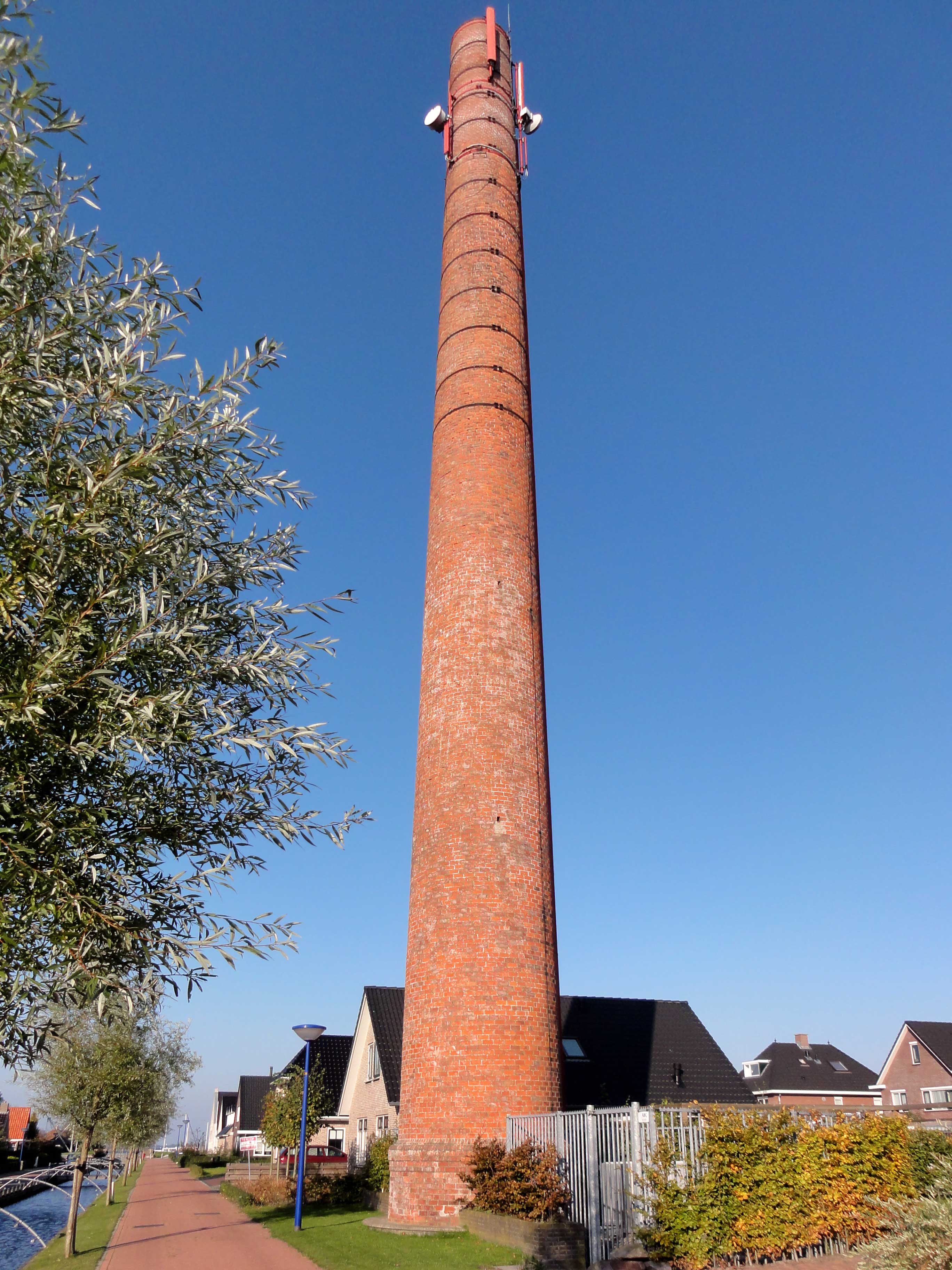 Oosterzee-Gietersebrug met schoorsteen van afgebroken zuivelfabriek